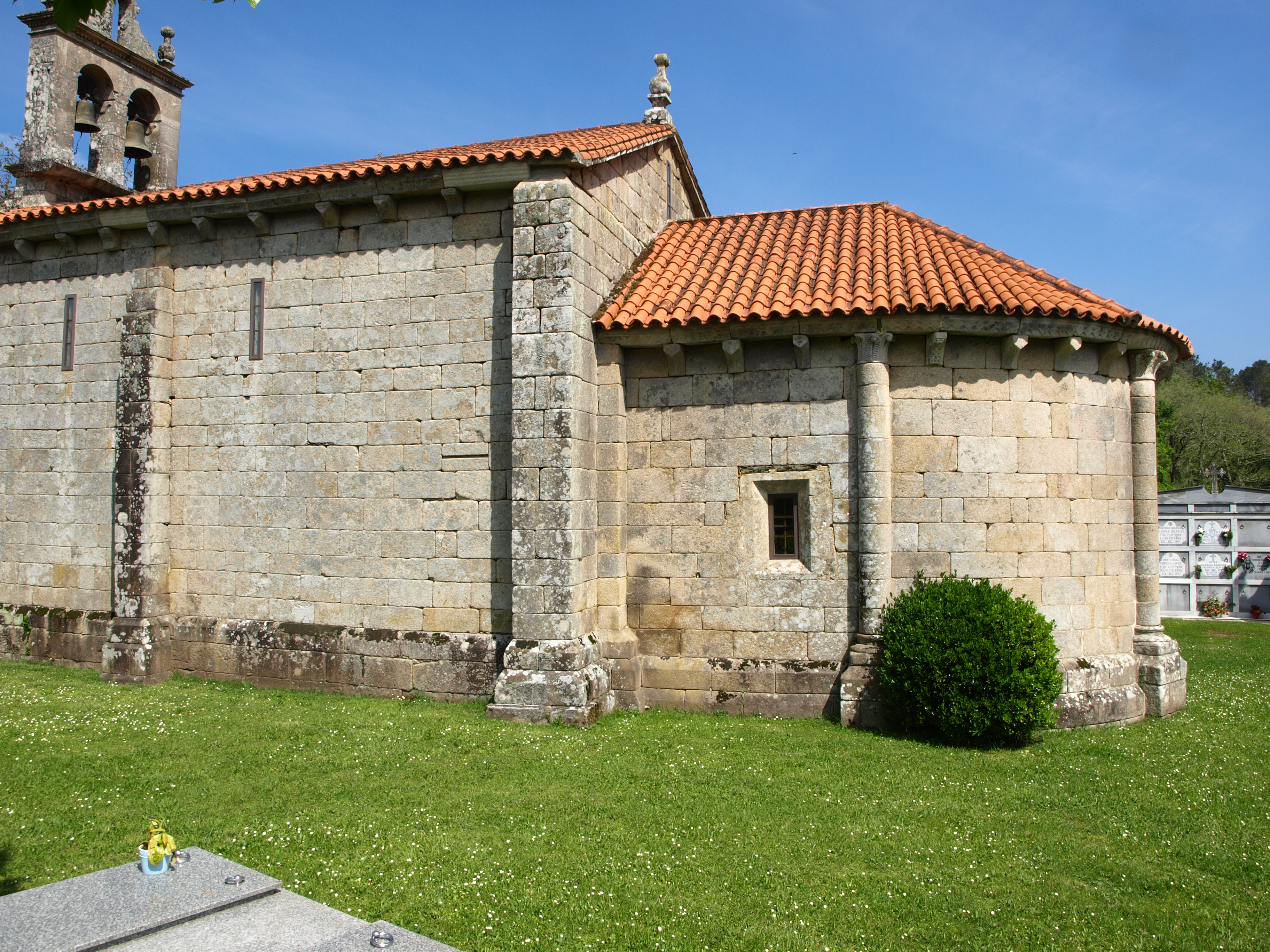 Igrexa Parroquial de Órrea (Agolada) Vista Leste